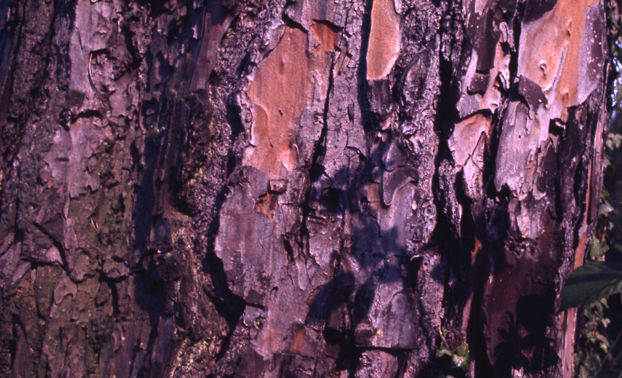 Serie fotografica : Cervia, 1974 / Paolo Monti. - Foglio: 1, Fotogrammi complessivi: 3/20 : Diapositiva, sviluppo cromogeno/ pellicola ; 35 mm. - ((Sullo chassis della diapositiva n. 01 iscrizione manoscritta: "Cervia". - Nel contenitore 331/345D tra i fogli in pvc contenenti le diapositive ritaglio di stampa fotografica con al verso iscrizione manoscritta: "Cervia/ Foto antiche/ Varie agricoltura regione". - Le diapositive nn. 01-17 costituiscono altre serie. - Occasione: Diapositive per audiovisivo "Cervia" per Regione Emilia-Romagna sugli aspetti del patrimonio naturale, artistico e culturale della città e territorio. - Fonte: Rubrica di Paolo Monti (1948-1982), presso Archivio Paolo Monti. Rubrica con elenco soggetti e numeri di inventario (da 1 a 1000) corrispondenti ai fogli a tasche in pvc in cui sono contenute le diapositive.: Diapositive 24x36mm